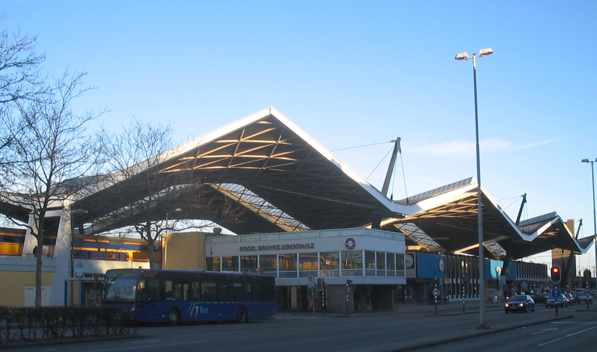 Zicht op deel van de voorkant van Centraal Station Tilburg, gelegen aan de Spoorlaan, niet ver van het centrum van tilburg, dec. 2005